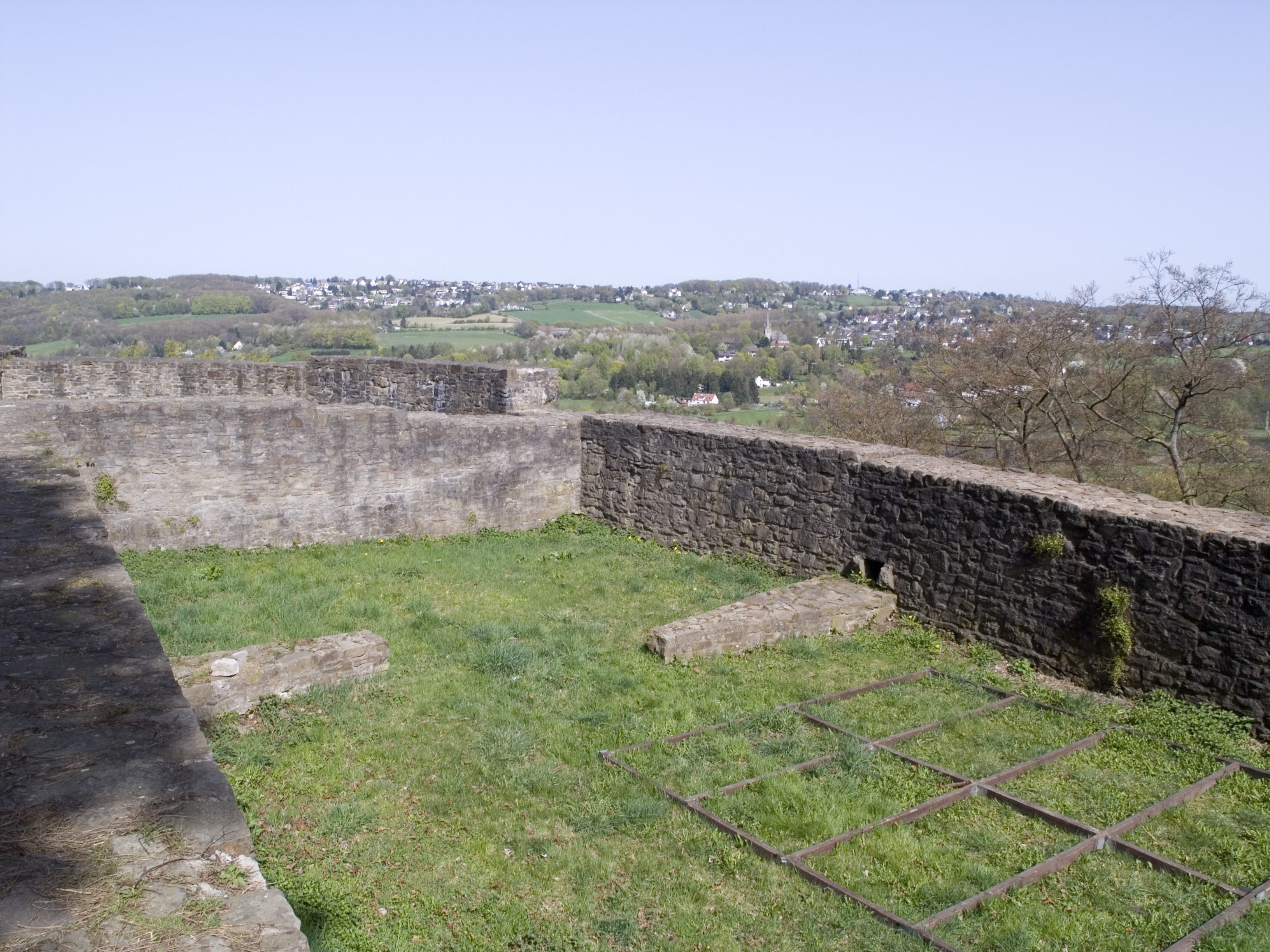 Северный Рейн - Вестфалия, Хаттинген. Замок Бланкенштайн